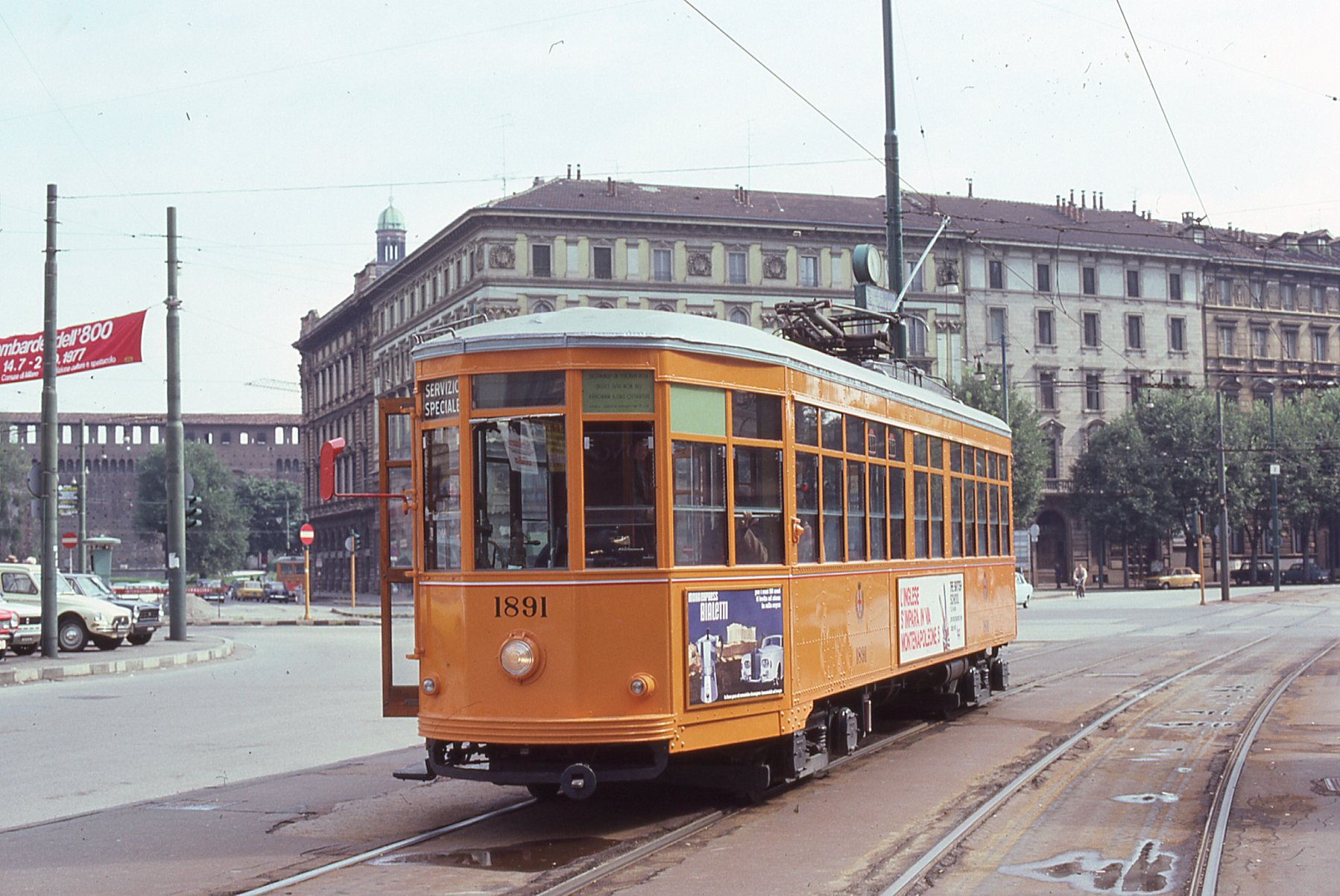 Vettura tranviaria 1891 dell'ATM di Milano in piazza Cadorna